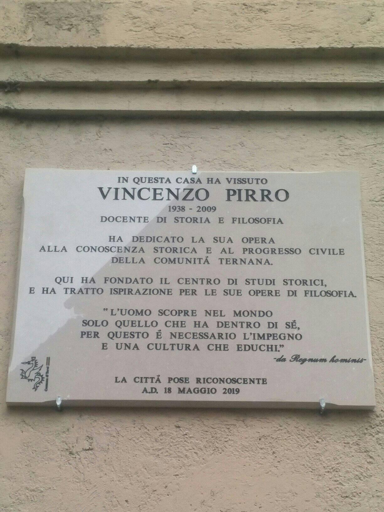 Targa commemorativa di Vincenzo Pirro sita in Piazza Clai a Terni